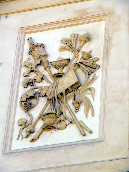 Asti, facciata della Chiesa SS Trinità.part.